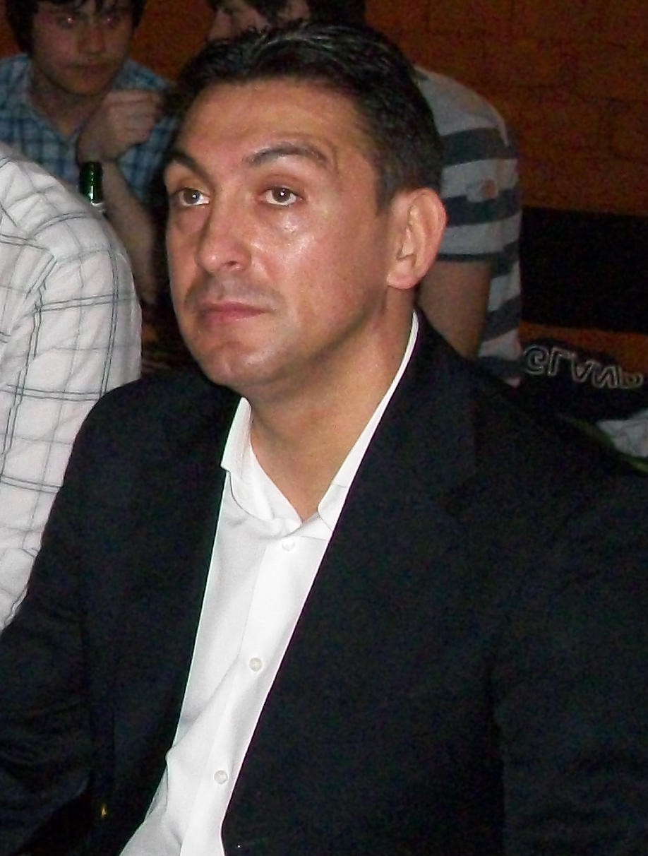 Ilie Dumitrescu, football player from Romania.